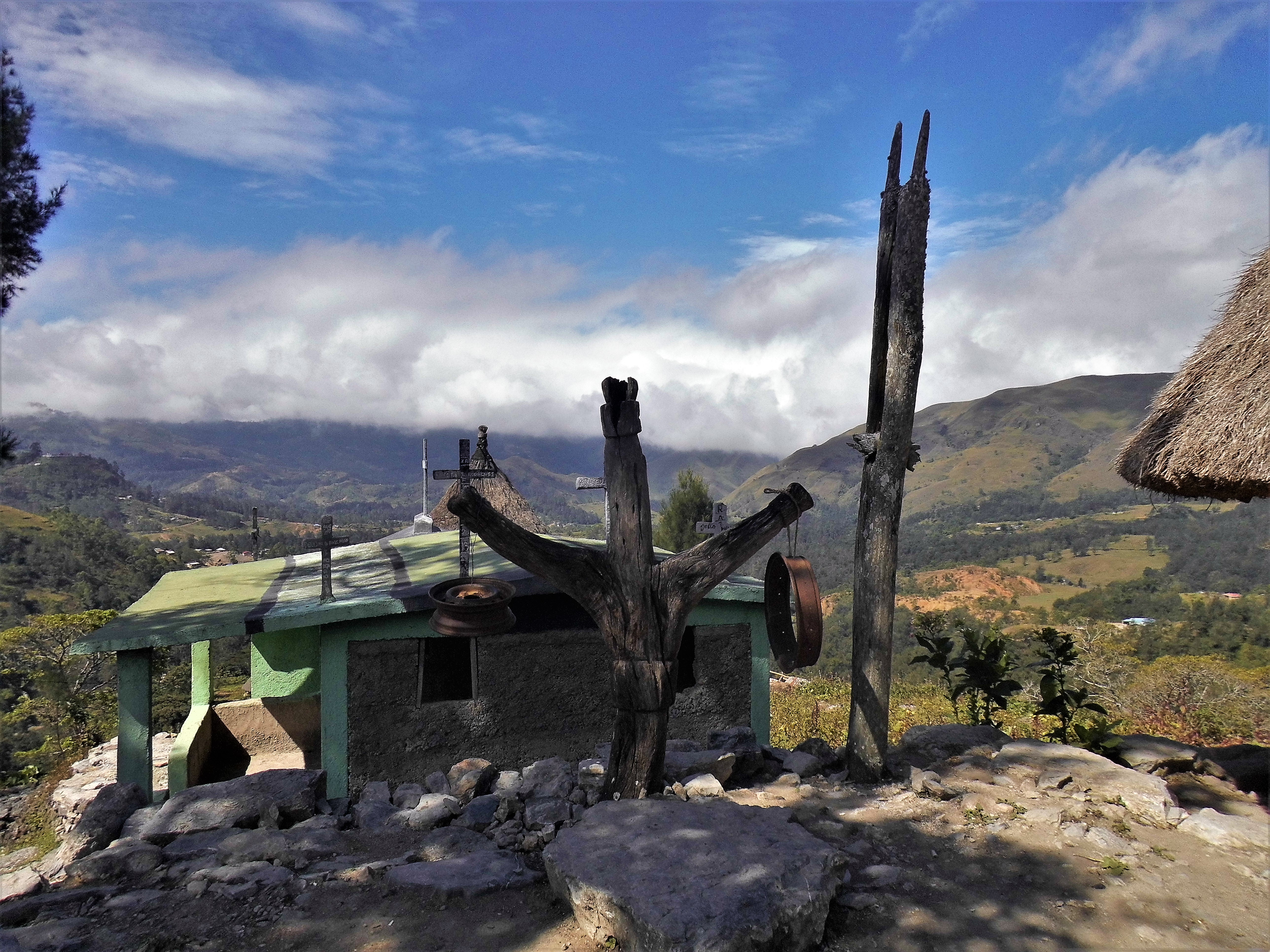 Totem in Maubisse